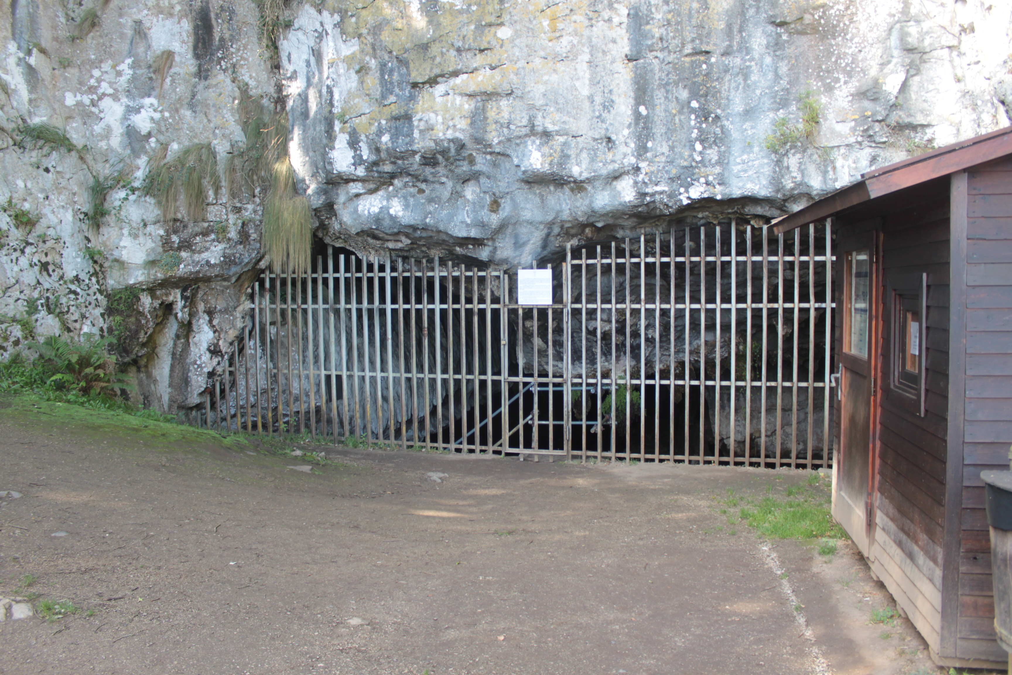 Entrada a la cueva del Pindal, Pitiango, Ribadedeva, Asturias